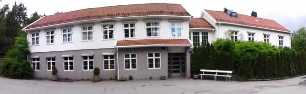 Gamle Bråstad skole i Arendal, Norge